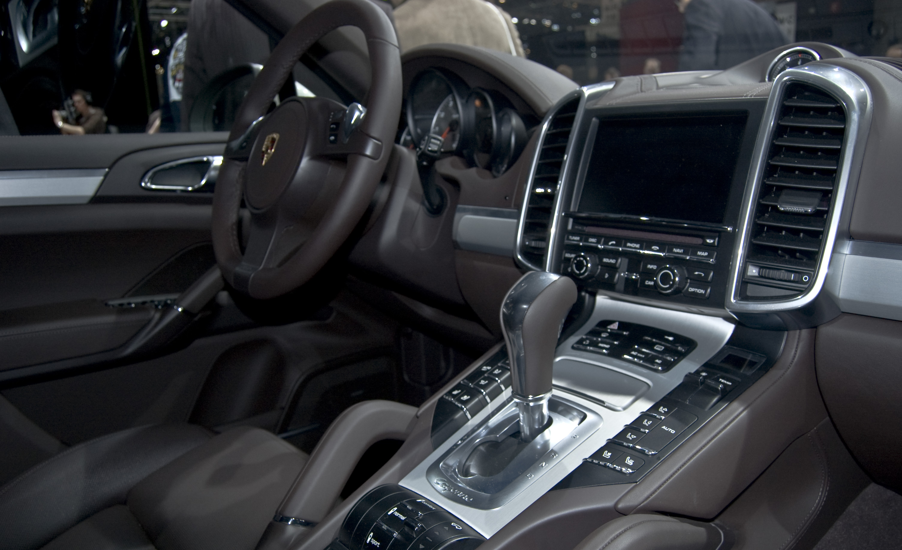 Porsche Cayenne Hybrid en el Salón de Ginebra 2010.